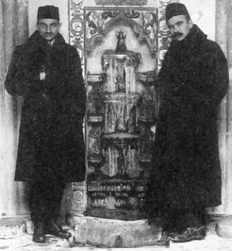 Лидеры крымских татар Джафар Сейдамет и Челеби Челебиев (Номан Челебиджихан) у Бахчисарайского фонтана. До 1918 года.